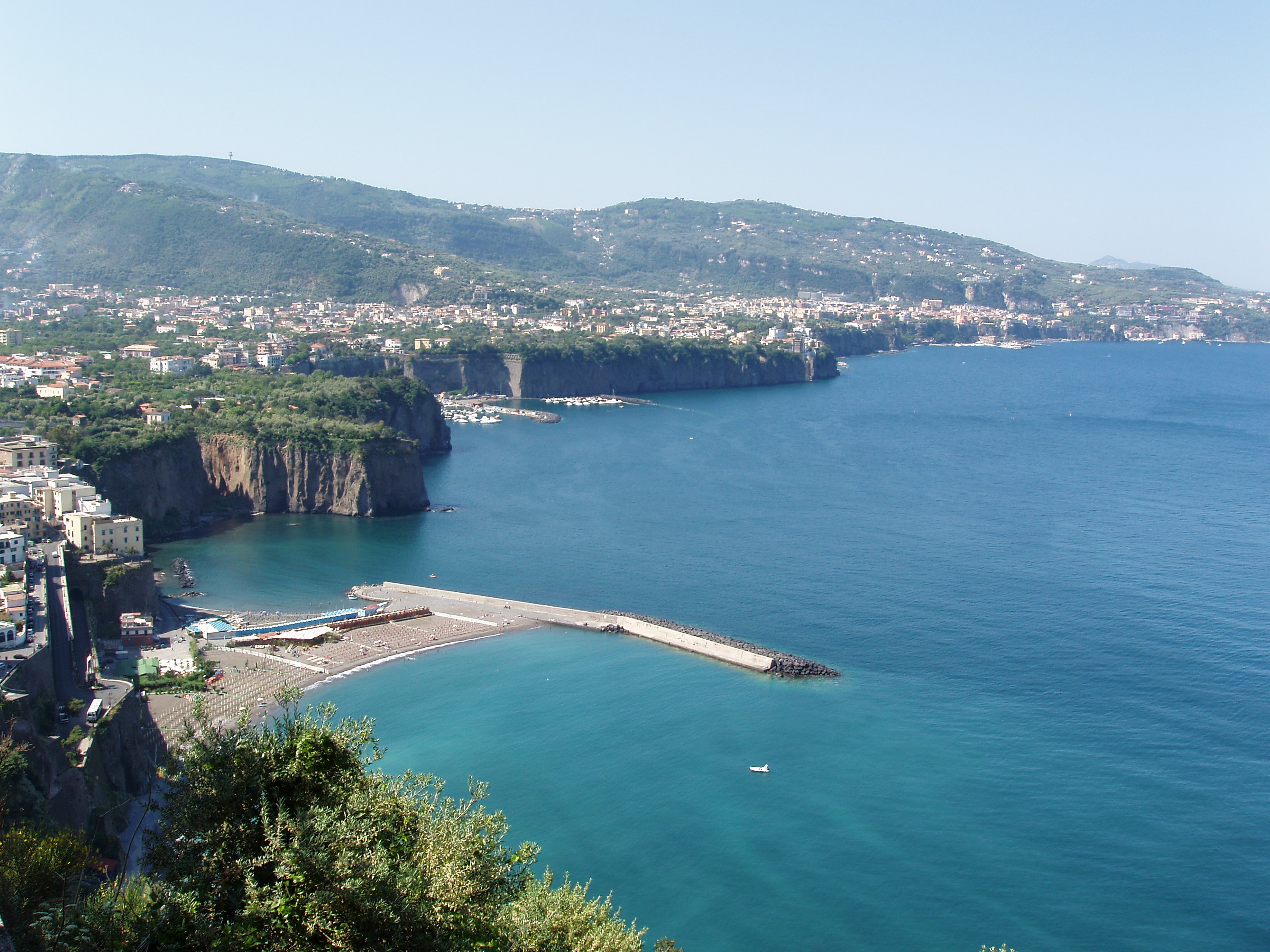 View of Sorrento from Meta di Sorrento, Campania, Italia. Description in de wikipedia Bildbeschreibung: Küste von Sorrent - Blick von Osten im Mai 2005 Quelle: selbst fotografiert Fotograf/Zeichner: Otberg Datum: 25.05.2005